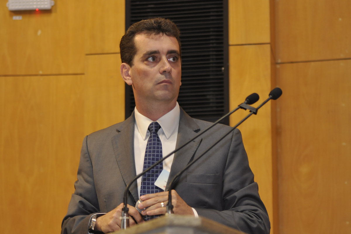 Foto: Reinaldo Carvalho